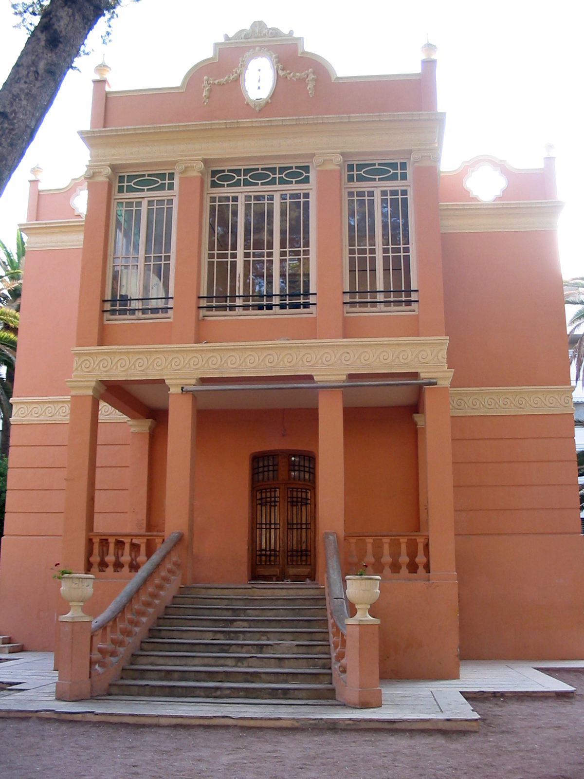 Fotografía de la Casa grande del Jardín de la Música de Elda, Alicante, España.